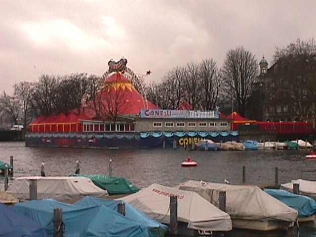 Zürich : Circus Conelli auf dem Bauschänzli (2005).